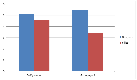 Effet du genre et de la condition expérimentale sur la perception de ses propres attitudes en sciences (1= peu doué-e; 7 = très doué-e. Source: Guimond, 2010.